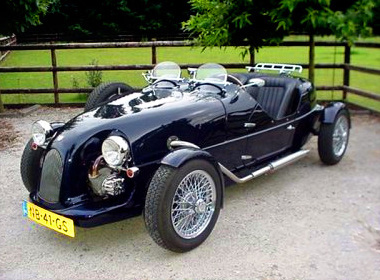 Le Patron vierwieler Foto gemaakt en geplaatst door Wim van den Bergh Foto staat op en kan vrij gebruikt worden